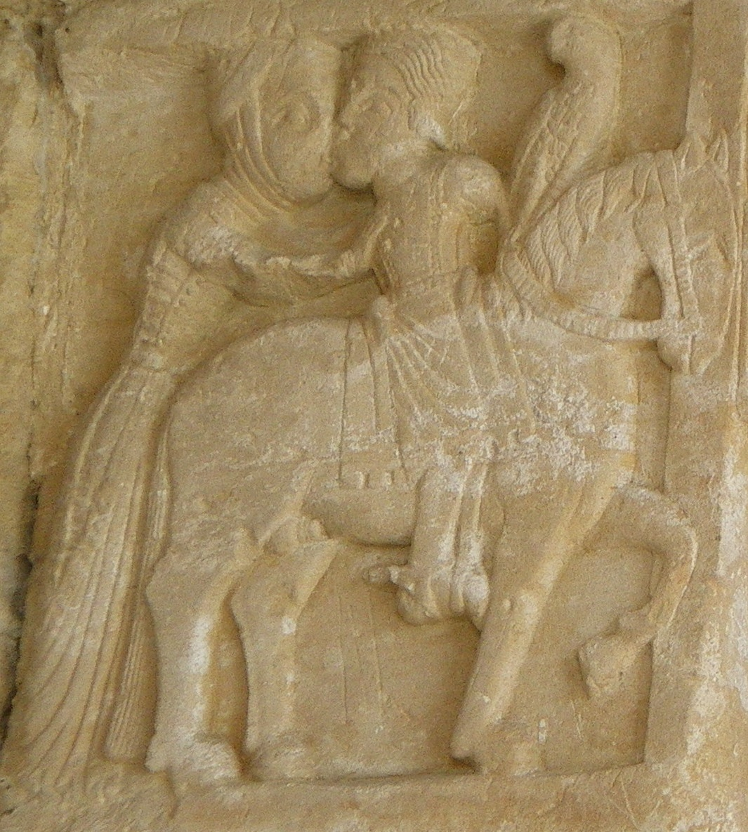 Monasterio de San Pedro de Villanueva (s.XII) - Portada - Detalle: historia del rey Fávila; partida para la jornada de caza